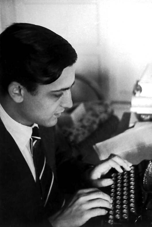 عکس نویسنده